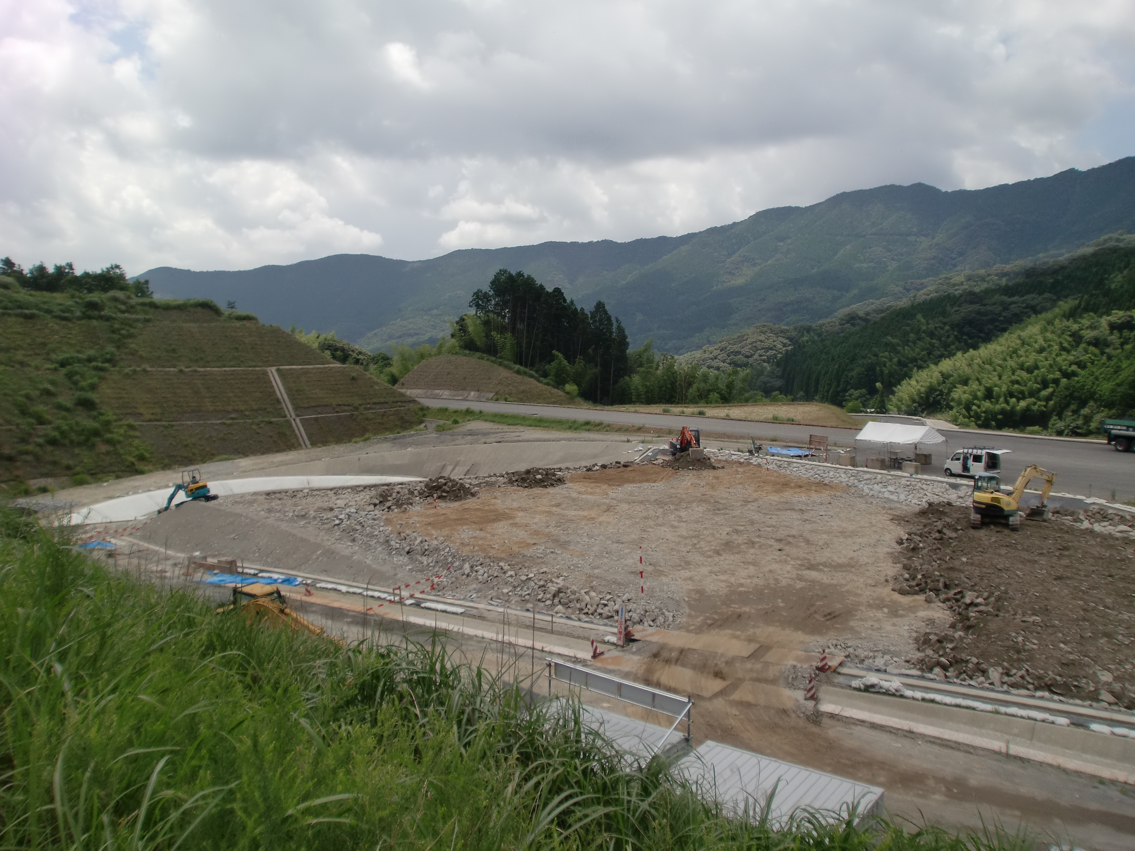 北薩横断道路のきららIC（建設中）のランプ附近